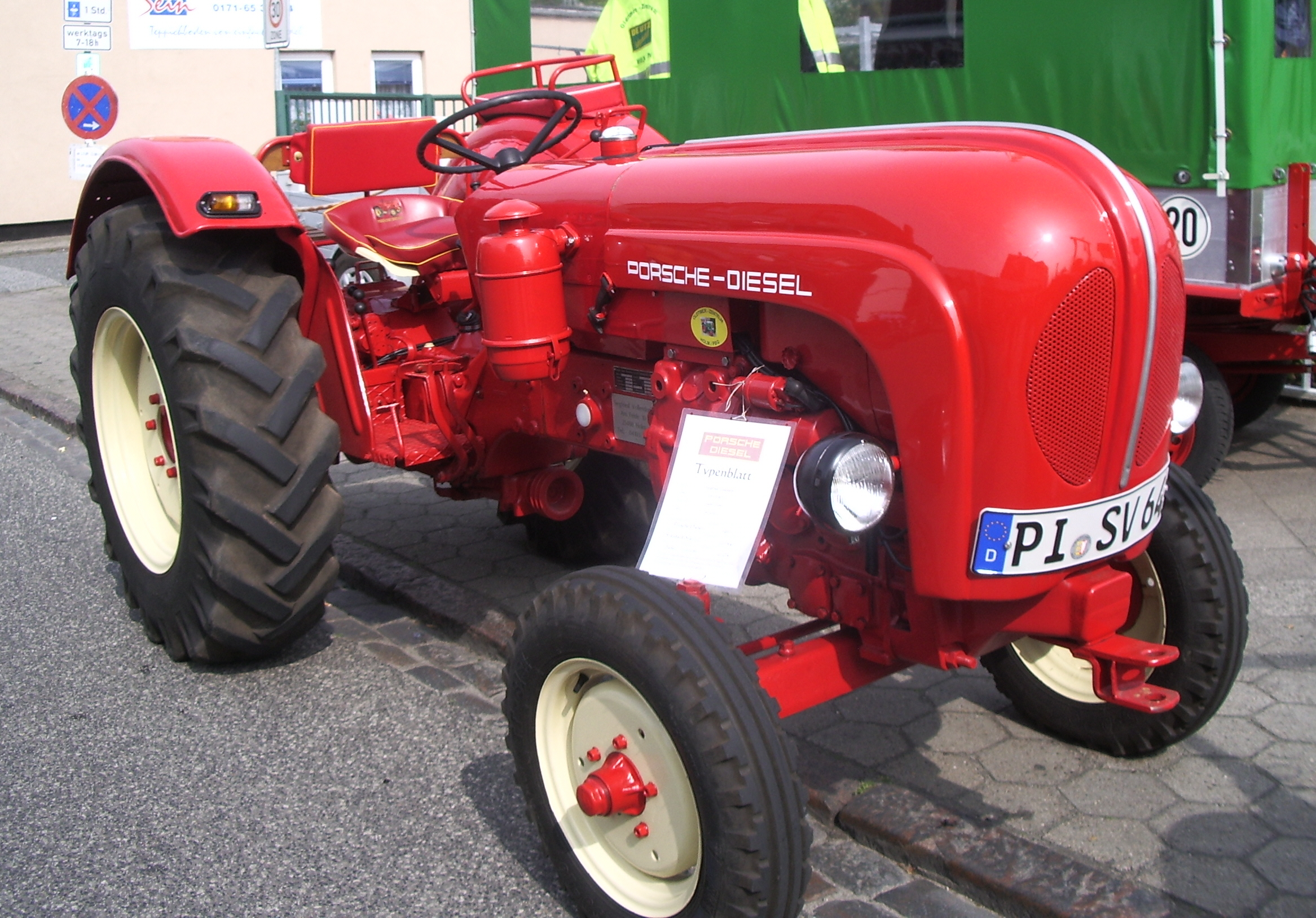 Porsche-Diesel Standard-Star 219 beim Oldtimertreffen in Uetersen. Baujahr: 1961 Gewicht: 1510 Kg Hubraum: 1750 ccm Motorleistung: 30 PS